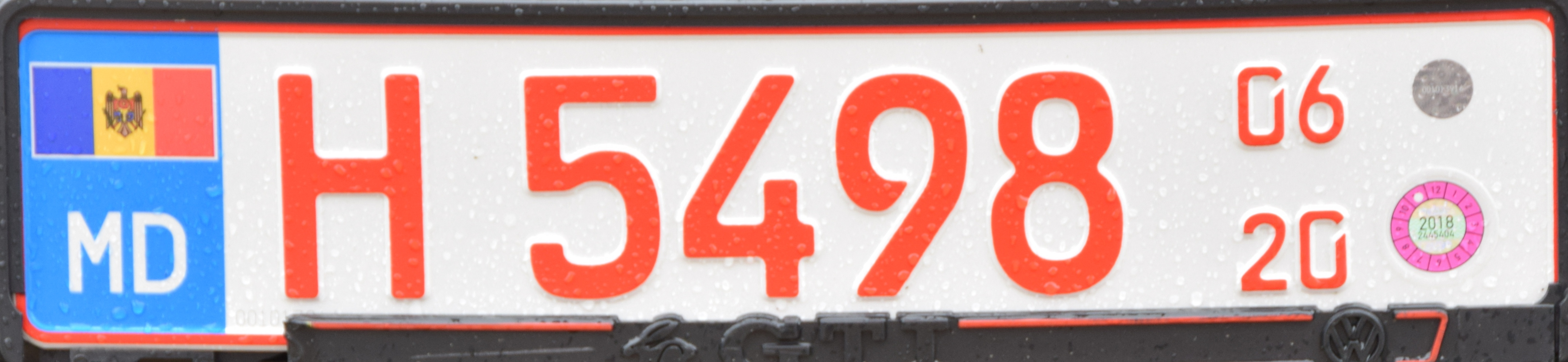 Kentekenplaat Moldavië